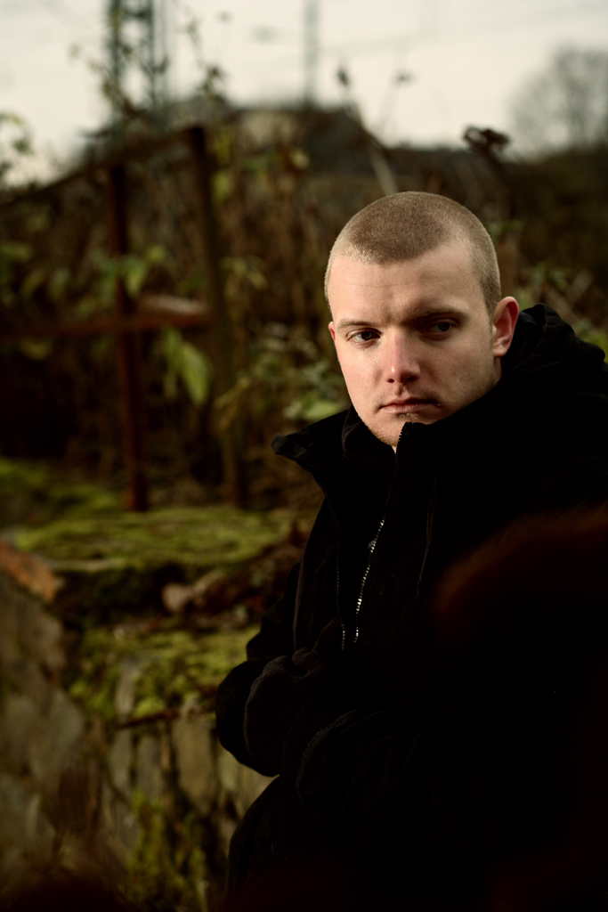 Rapper Shiml im Jahr 2009